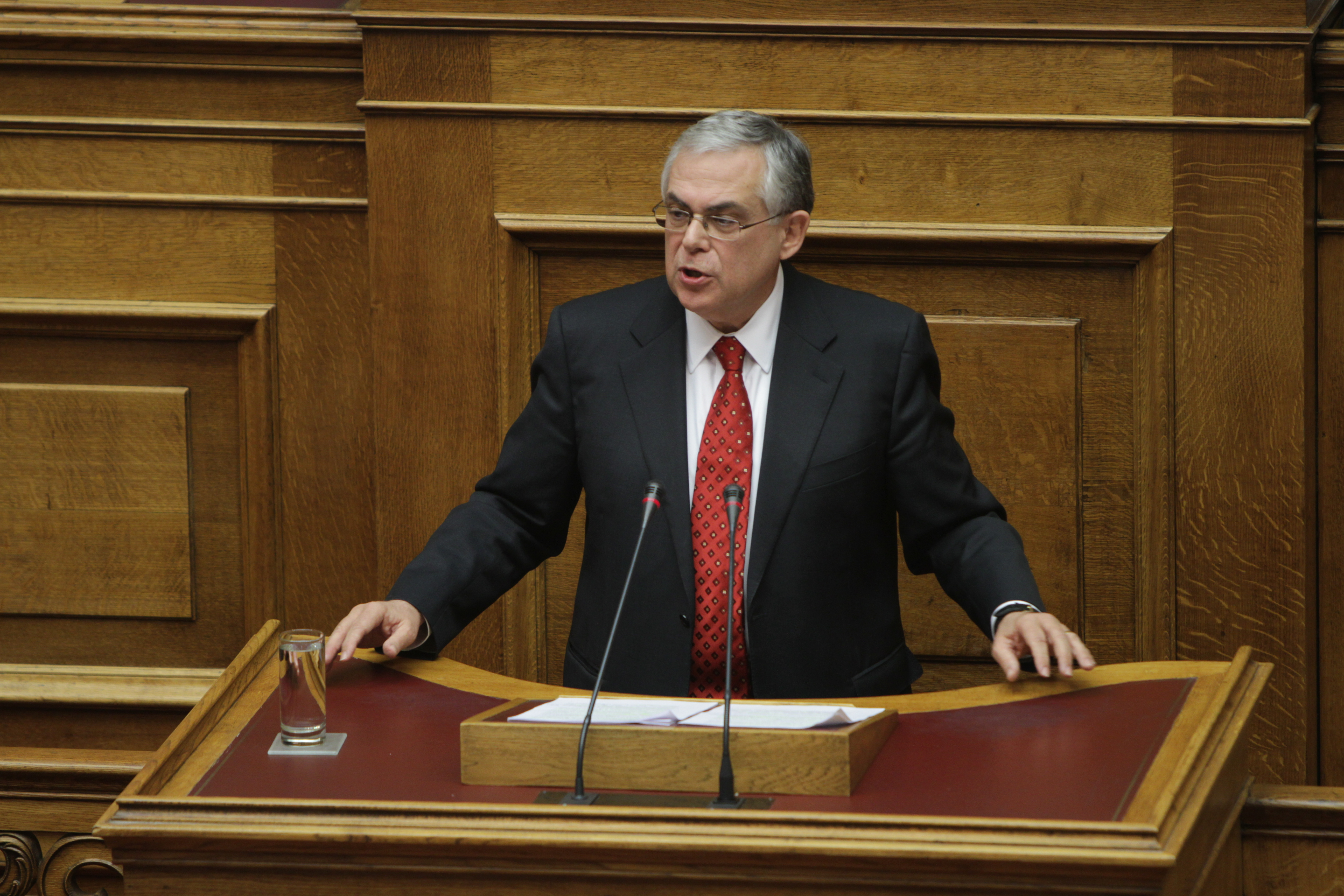 Συζήτηση επί των Προγραμματικών Δηλώσεων της Κυβέρνησης - Ομιλία Πρωθυπουργού και Ψήφος Εμπιστοσύνης Αίθουσα Ολομέλειας, Κοινοβούλιο 16 Νοεμβρίου, 2011